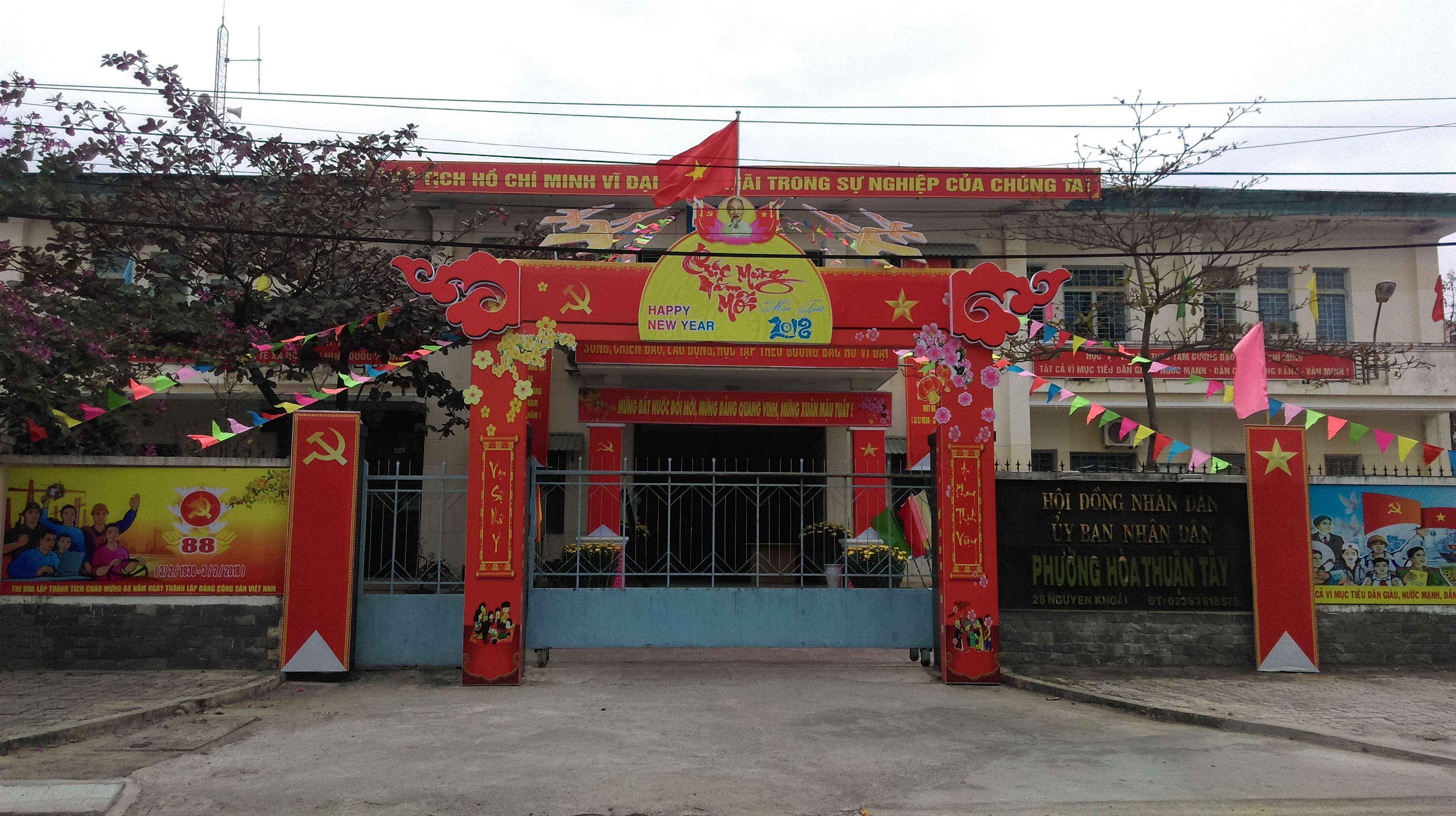 UBND phường Hòa Thuận Tây, Hải Châu, Đà Nẵng